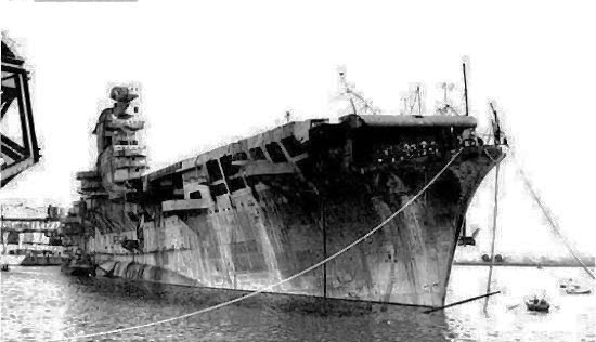 Lo scafo della portaerei Aquila nel porto di Genova danneggiato in seguito ad un bombardamento alleato